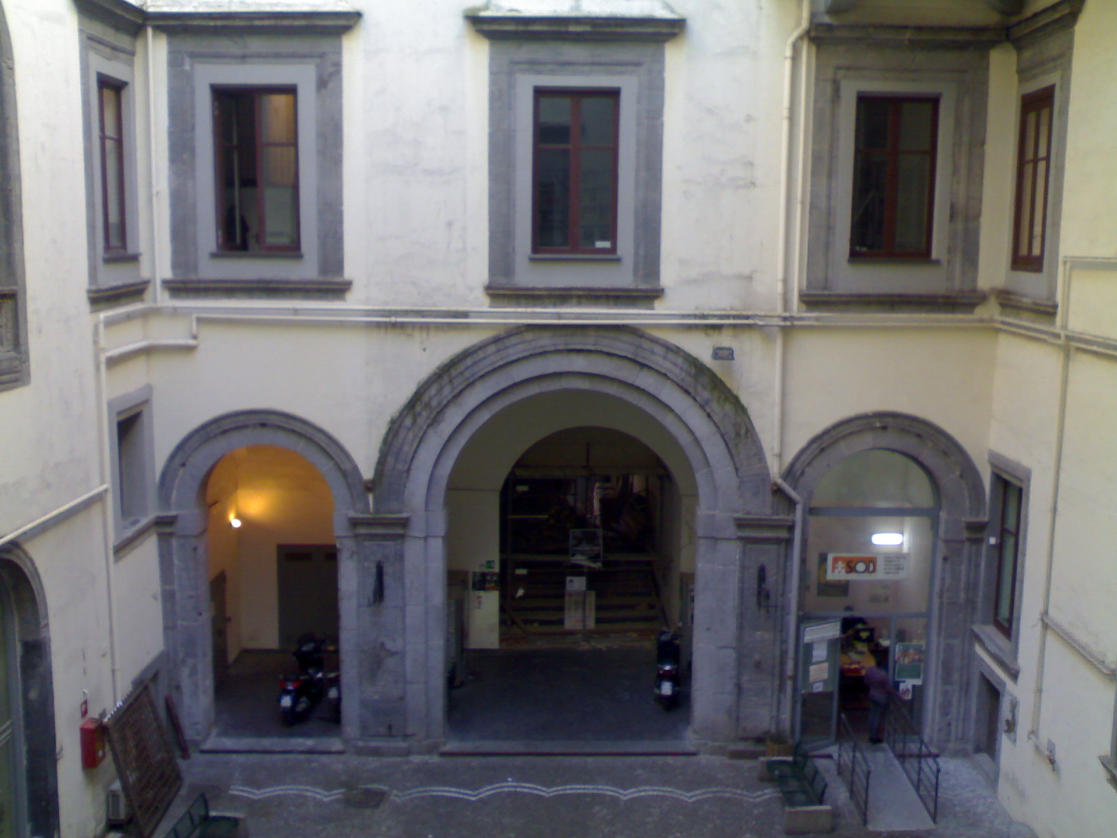 Palazzo Giusso (Napoli)